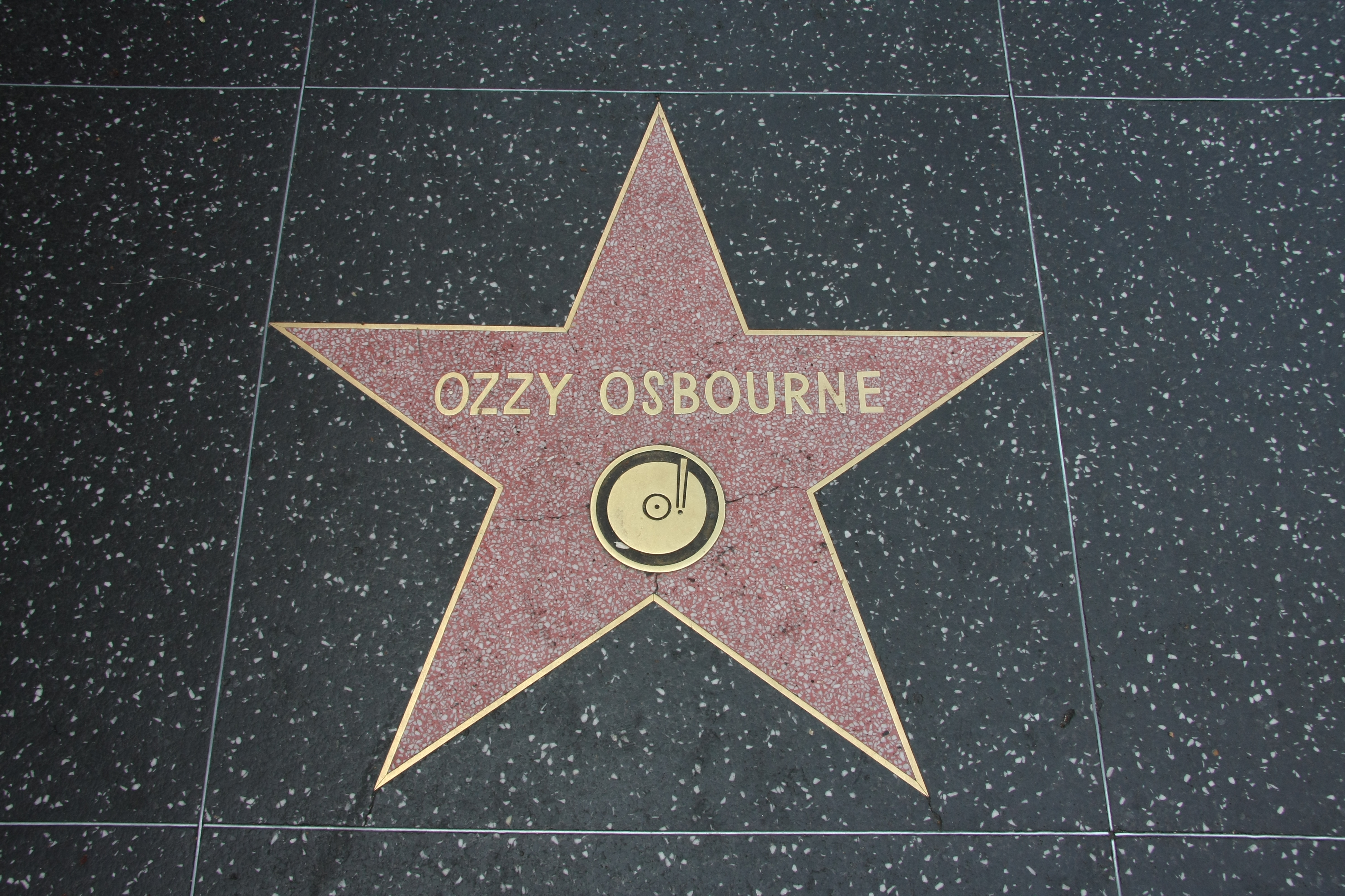 Ozzy Osbournes Stern auf dem Hollywood Walk of Fame in Los Angeles.